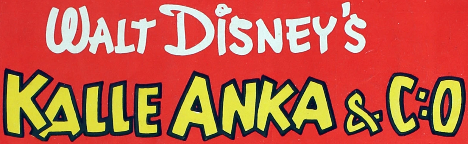 Loggan på framsidan av serietidningen Walt Disneys's Kalle Anka & C:o nr 1/1948. Enligt Joakim Gunnarsson, som varit inblandad i arbetet med jubileumsboken 70 år med Kalle Anka & C:o (2018), är det okänt vem/vilka som skapat loggan. (Källa: Facebook-kommentar 2019-04-29. Citat: "Finns ingen känd formgivare till loggan. Vi letade uppgifter under produktionen av förra årets jubileumsbok.")